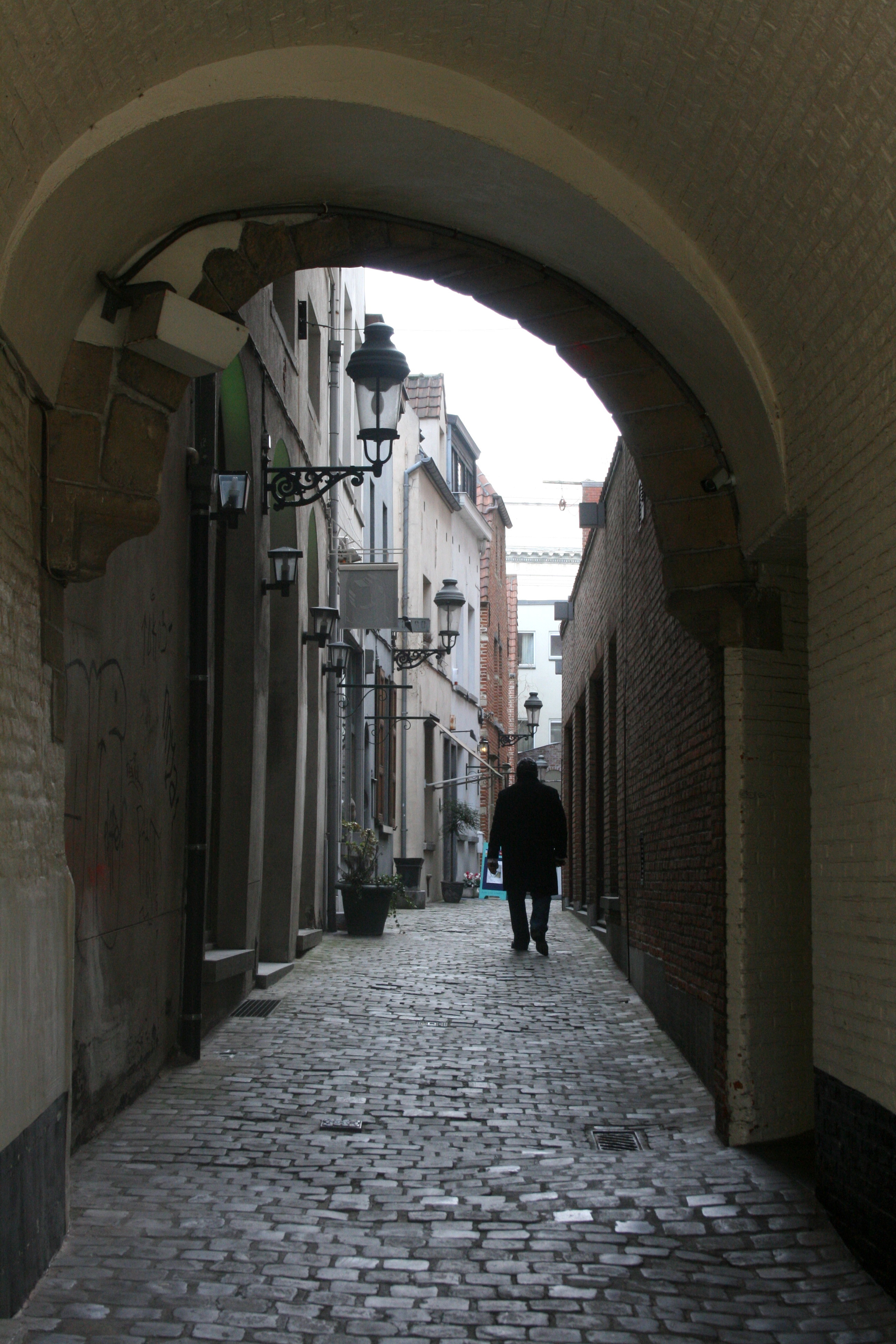 Impasse Saint-Jacques, Bruxelles (Belgique), débouchant place du Grand Sablon